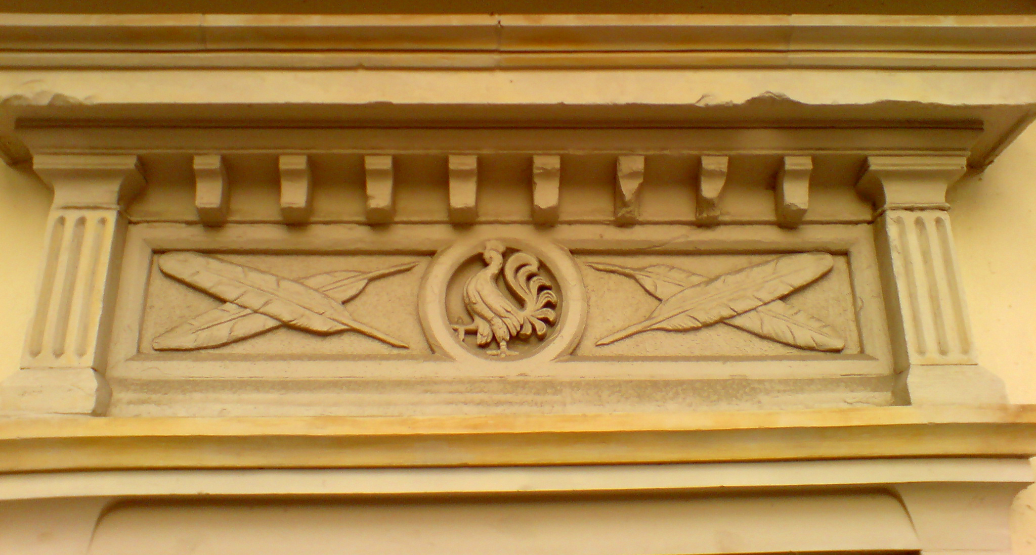 Hahnsche Buchhandlung, Hahn mit Schreibfedern über dem rekonstruierten Eingang zum (ehemaligen) Verkaufsladen der Verlages